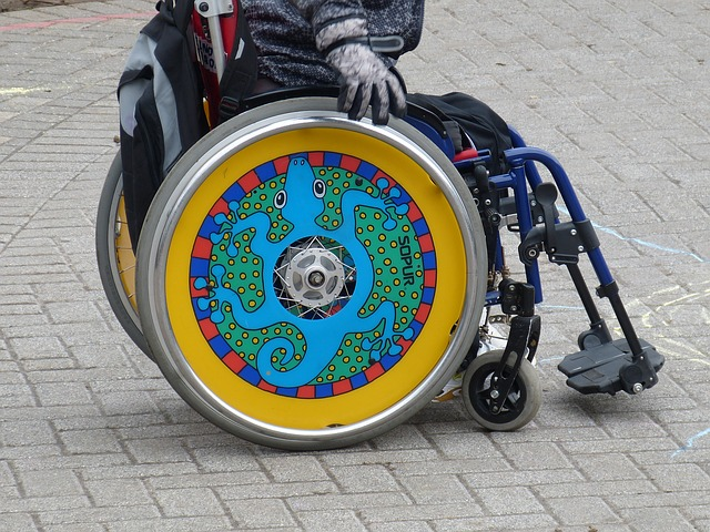 Ségrégation envers les handicapés